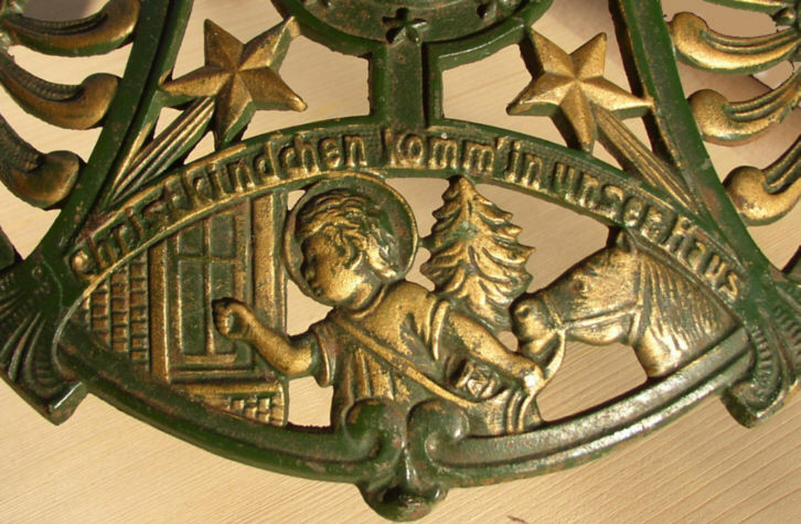 Darstellig vum Grischtkind oder Wiehnächtchind uf eme Grischtbaümständer.